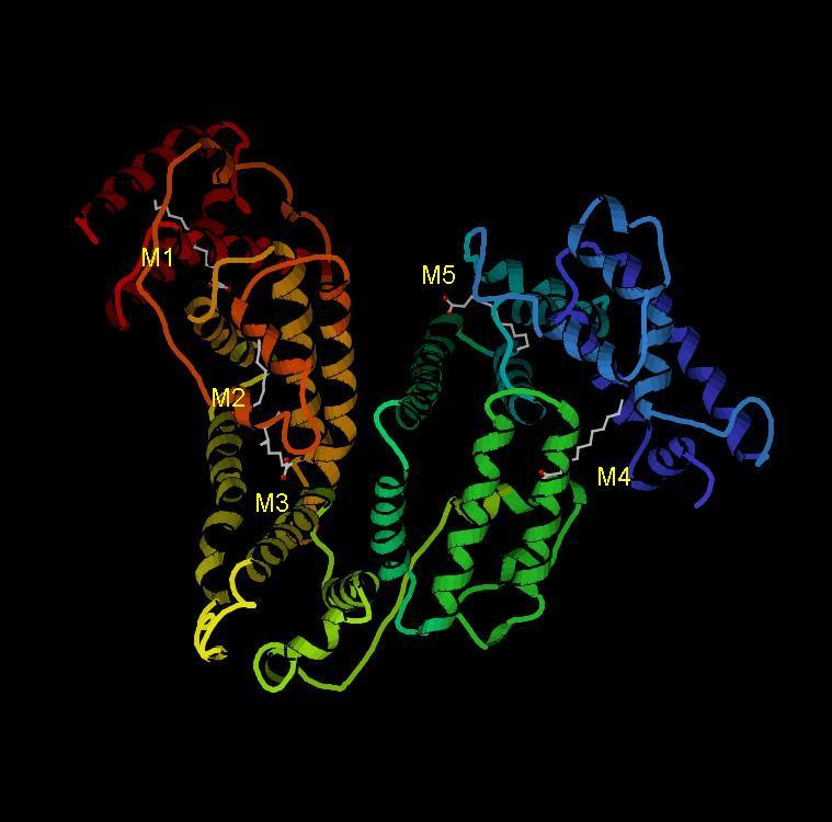 Albüminin miristik asite bağlanmış hali. M1-M5, miristik asit. Protein zinciri, izlenmesini kolaylaştırmak için, maviden kırmızıya doğru geçişen renklerle gösterilmiştir. Protein Databank'da [1] 1E7G [2] kayıtlı koordinatların KiNG görüntüleyicisi ile elde edilmiş resmidir.